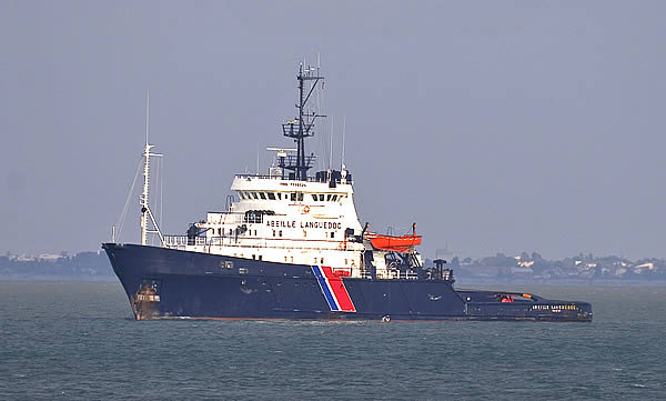 Le remorqueur Abeille Languedoc en rade de La Pallice - La Rochelle Â« Â» Photo issue de ma banque d'images. Alain Pep.per 7 aoÃ»t 2006 Ã 09:17 (CEST)